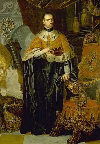 Porträt von Abt Berthold Dietmayr als Rektor der Wiener Universität, 1707; Gemälde von Jan Kupecký (wohl nach älterer Vorlage); Stift Melk